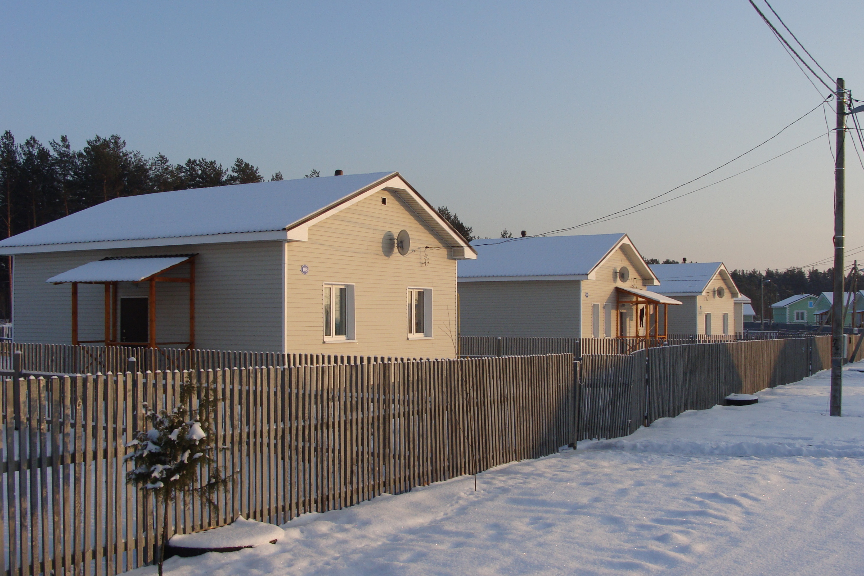 "Новое Моховое"